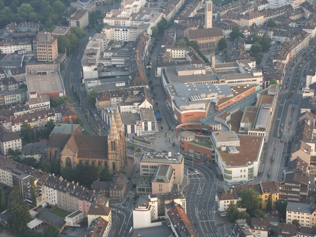 aus der Luft by Niederkasseler